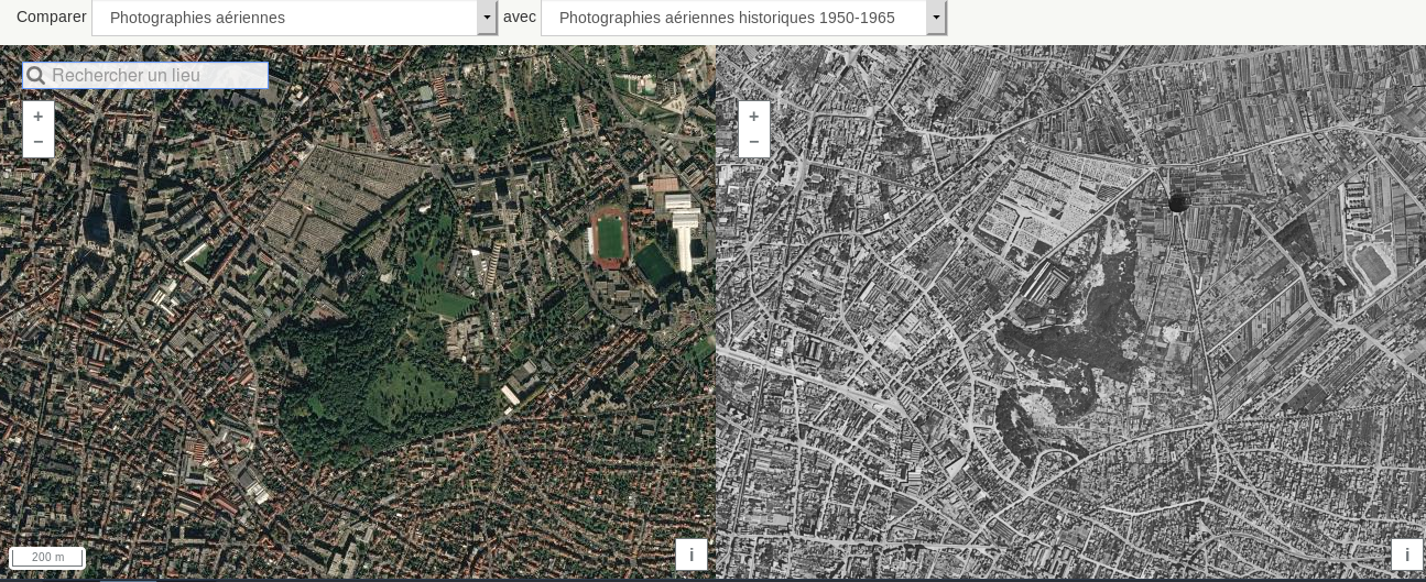 Capture d'écran des vues aériennes de 1949 et 2017 données par L'IGN sur son site " "